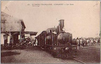 Guinée Française - Conakry - La Gare